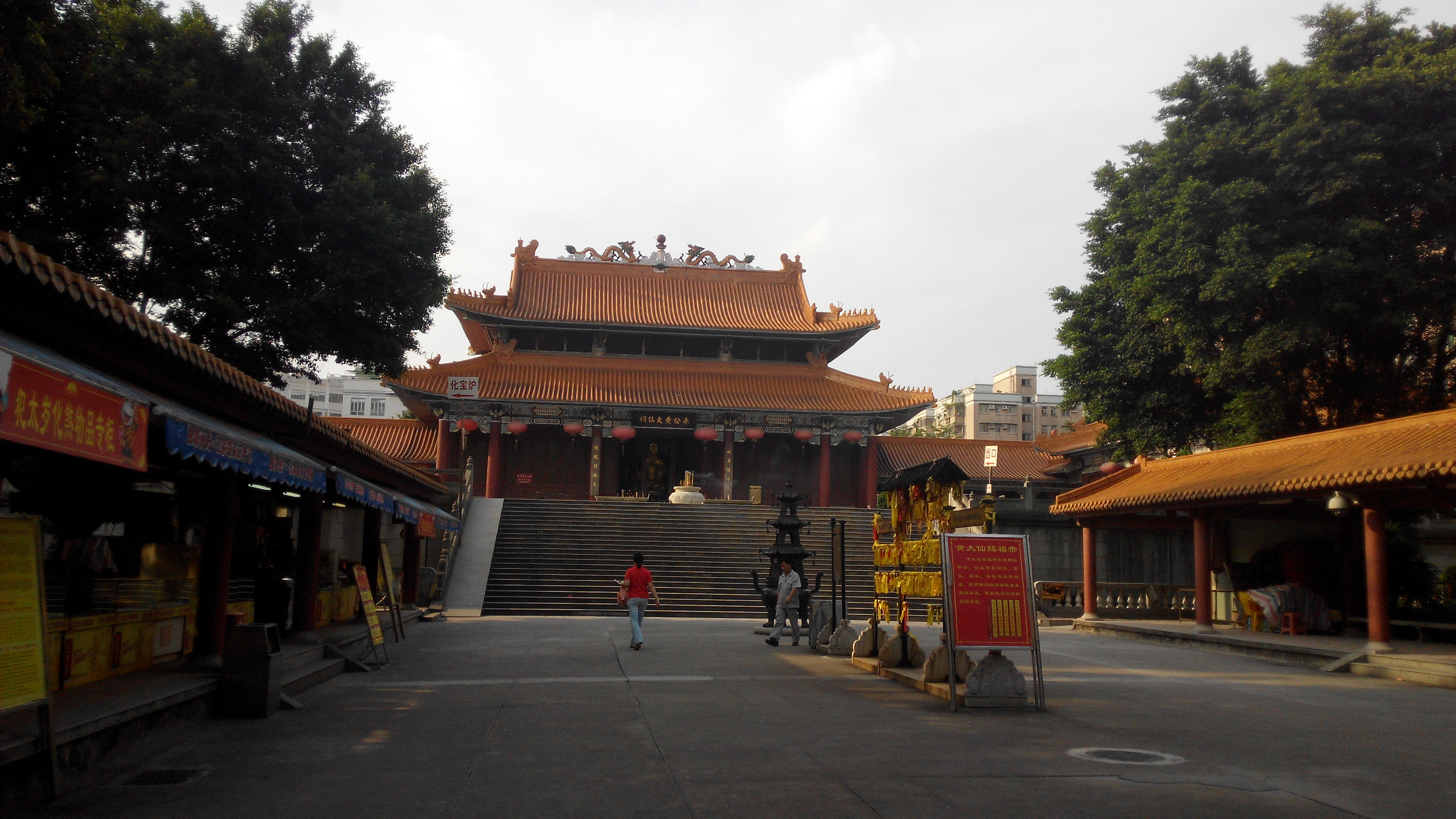 廣州市芳村黃大仙祠。版權說明：使用本相片必須署名，否則CC協議將失效，並追究相應的法律責任。